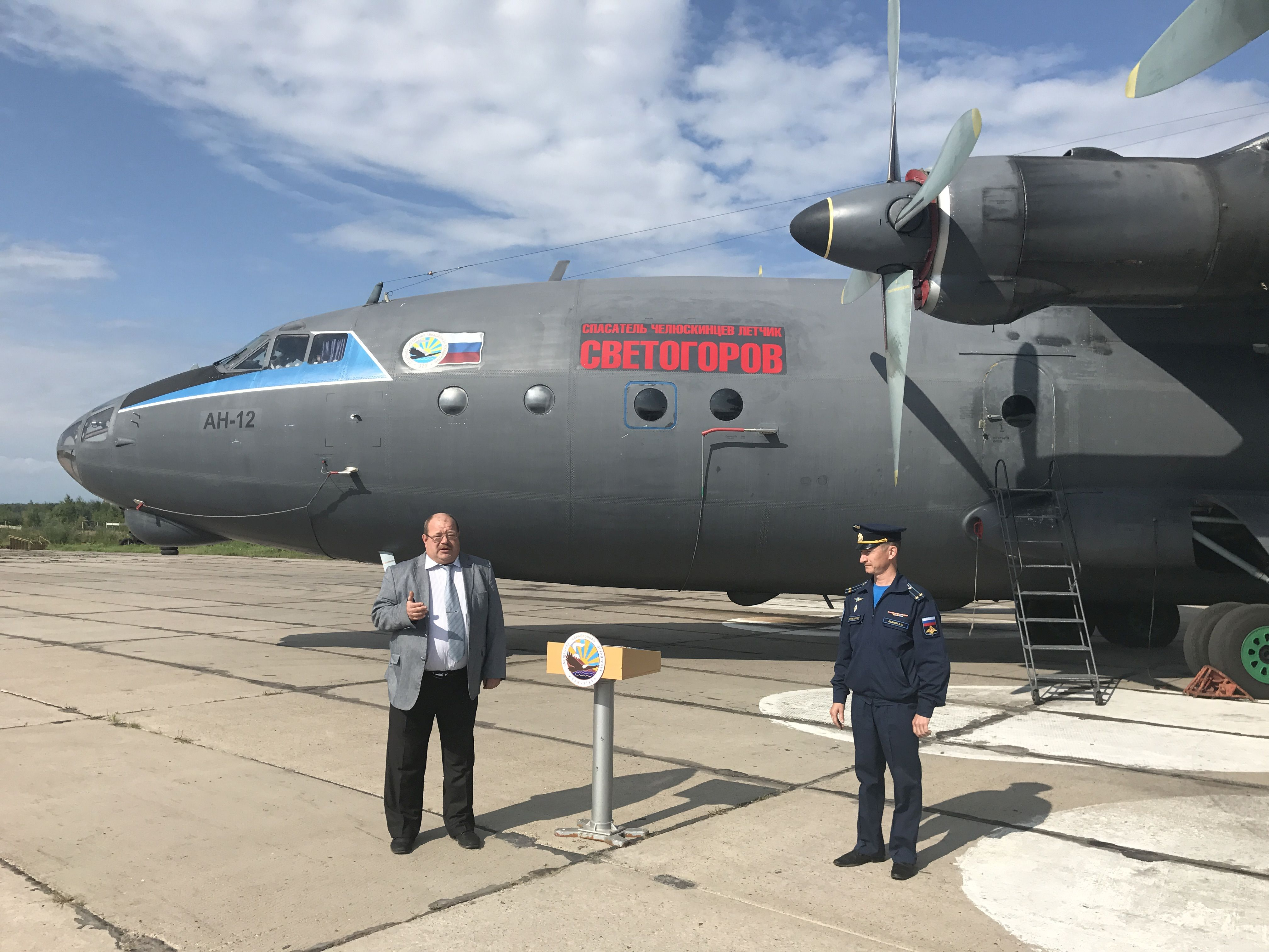 Ан-12БК «Спасатель челюскинцев летчик Светогоров»